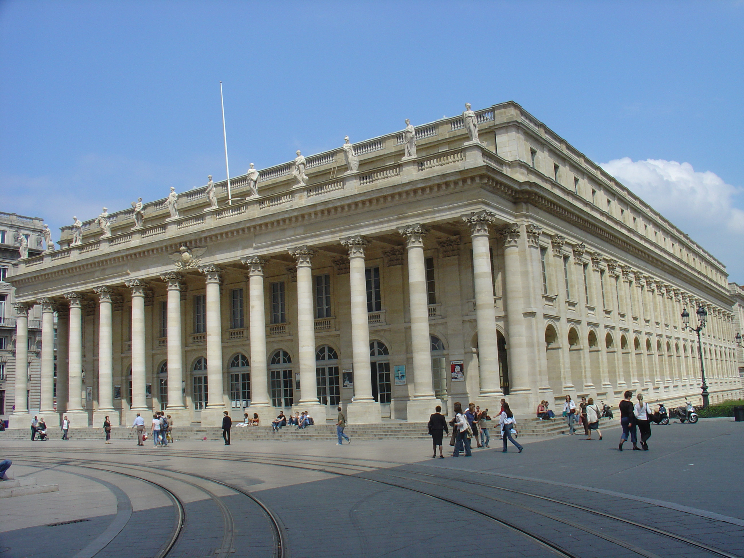 Grand Théâtre Bordeaux - Photo prise par Michel Buze en Avril 2006 (Licence GFDL)